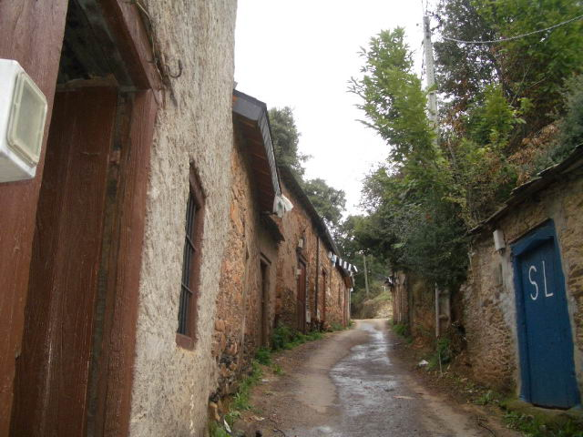 Covas Vilamartin de Valdeorras